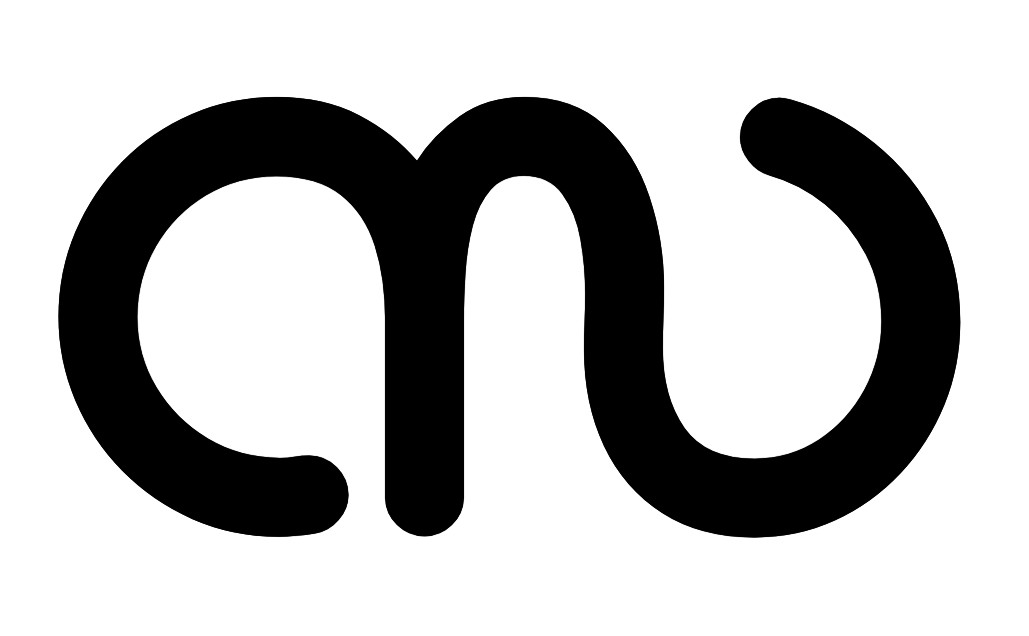 സ മലയാളം അക്ഷരം